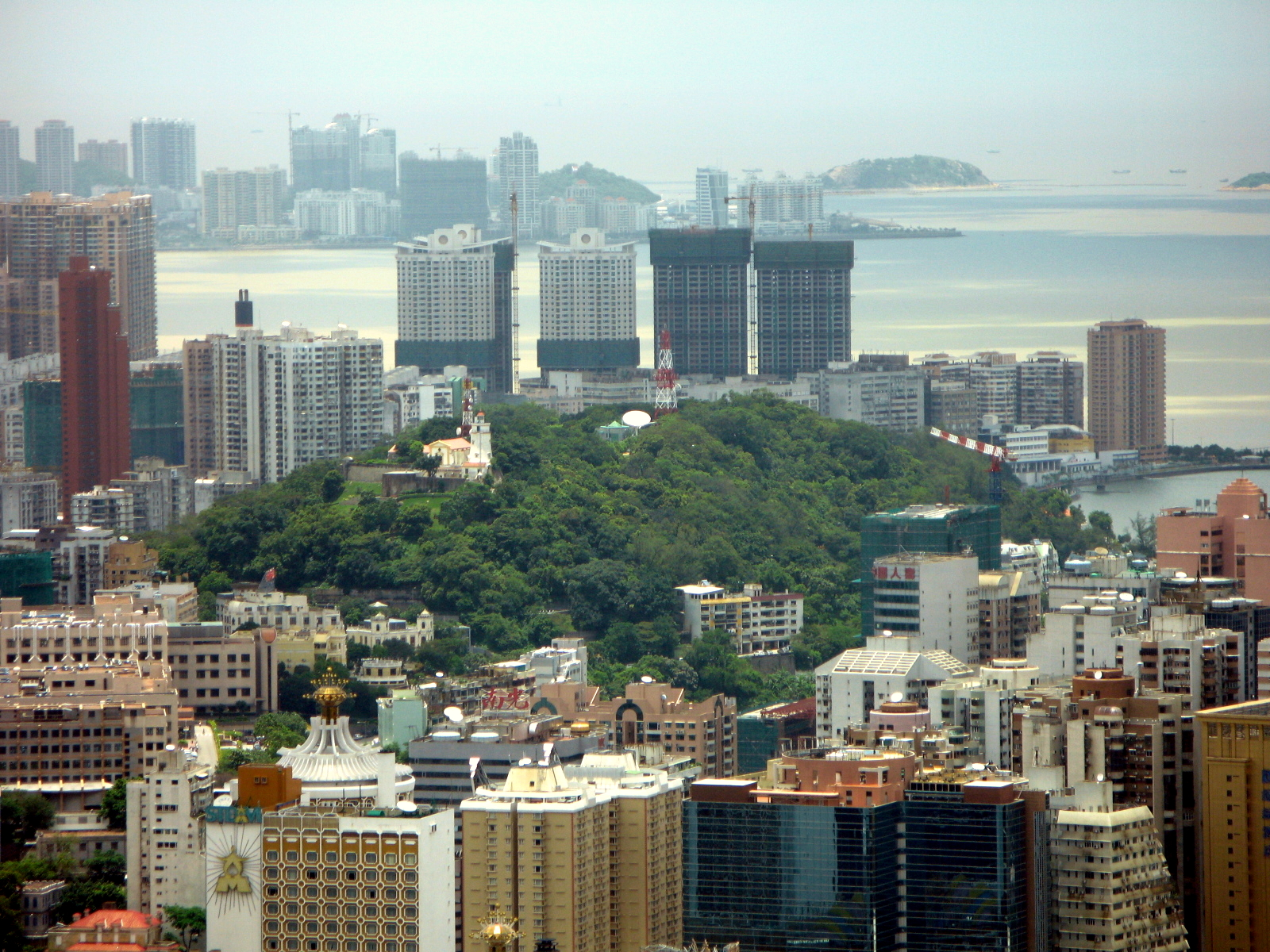 Macau Colina da Guia 澳門 東望洋山